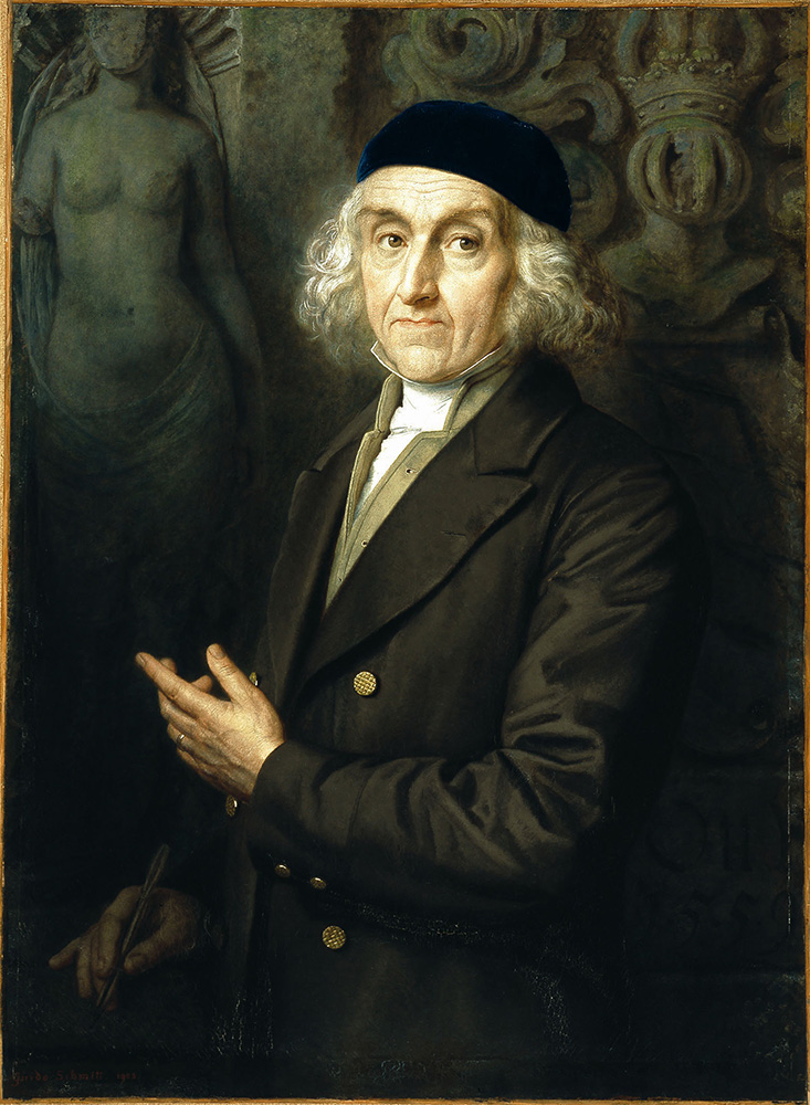 Charles de Graimberg aus Heidelberg, gemalt 1902 von Guido Philipp Schmitt